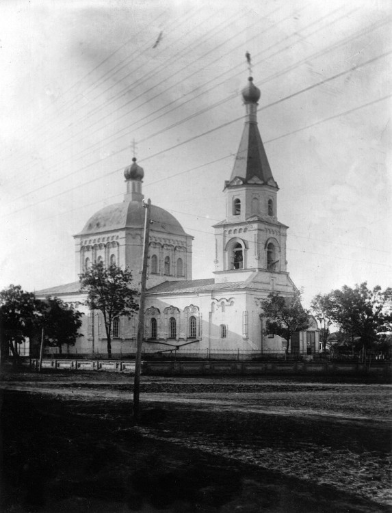 Никольская церковь в станице Егорлыкская Ростовская область